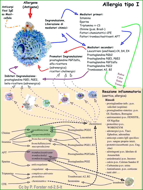 Grafica: Medicina: Fisiologia allergica di tipo 1 (anafilattica), corso studio assistito CSA, scuola superiore medico tecnica, Lugano, Ticino, Svizzera